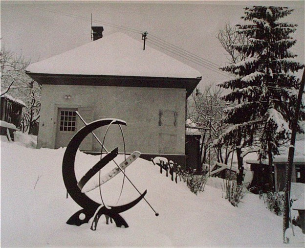 Hvezdáreň v roku 1966. Pôvodná budova